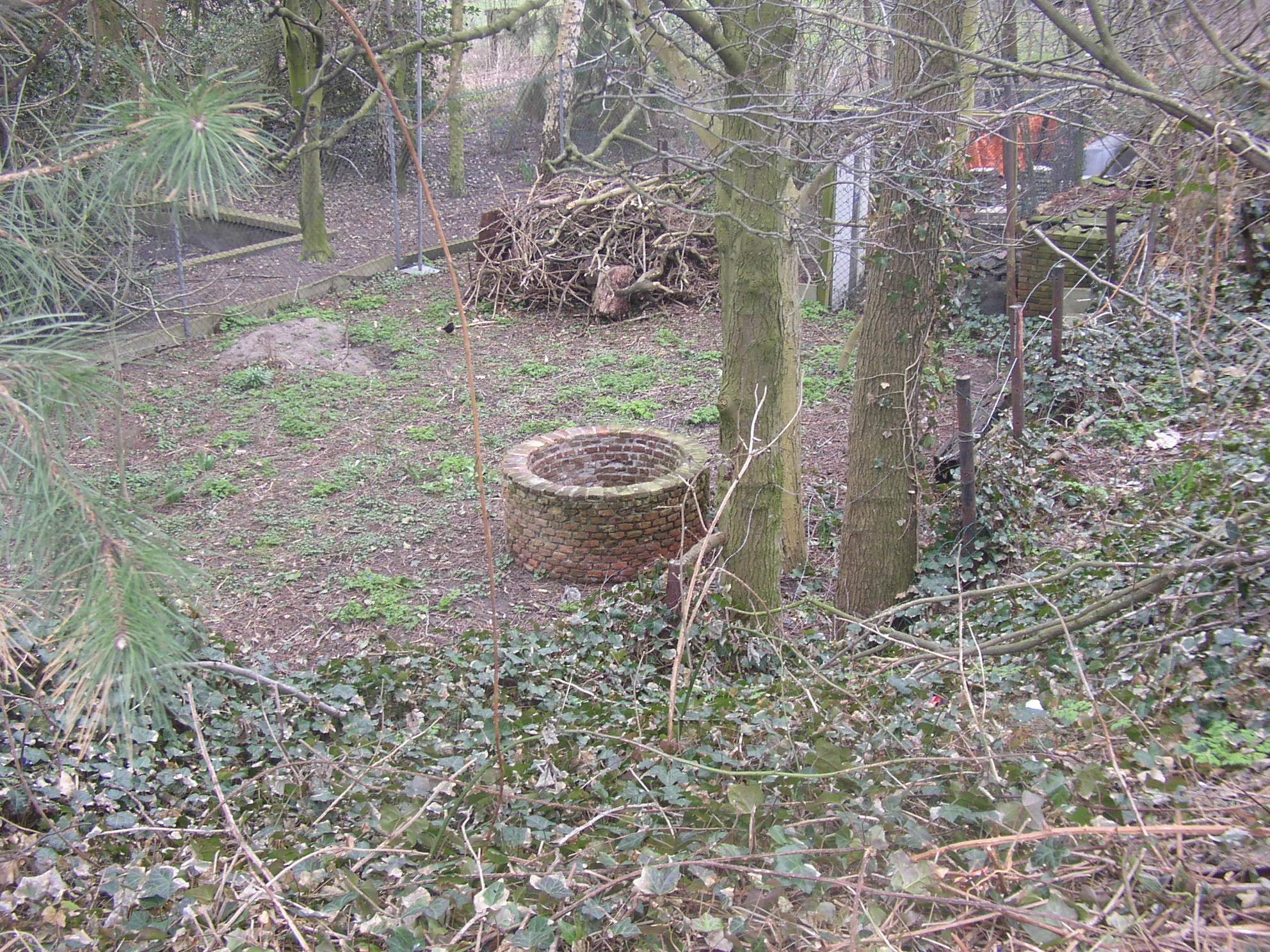 Oude waterput, monument te Noordwijk (Zuid-Holland)